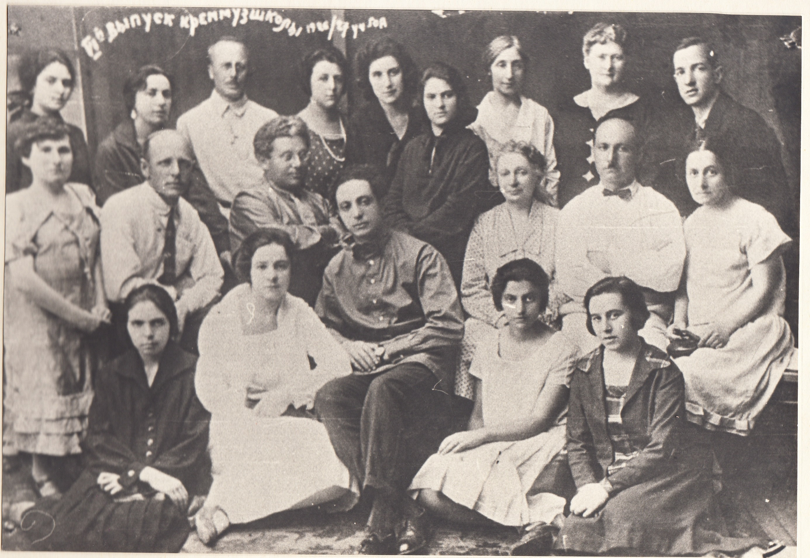 Випуск Кременчуцької музичної школи 1926-1927 рр.